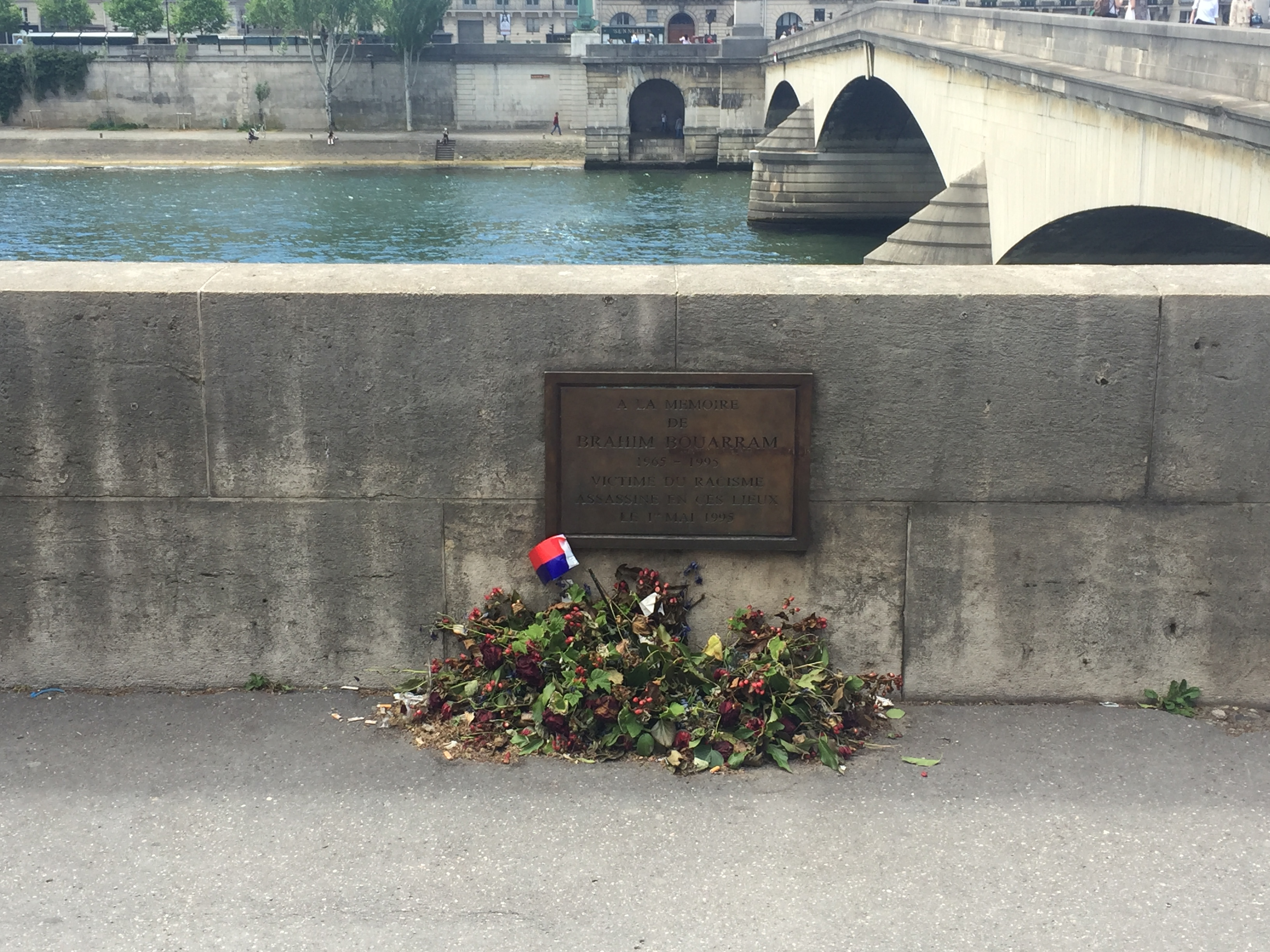 Plaque commémorative à l'Brahim Bouarram.